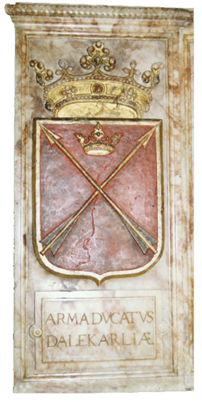 Dalarnas landskaps vapen vid Gustav vasas grav